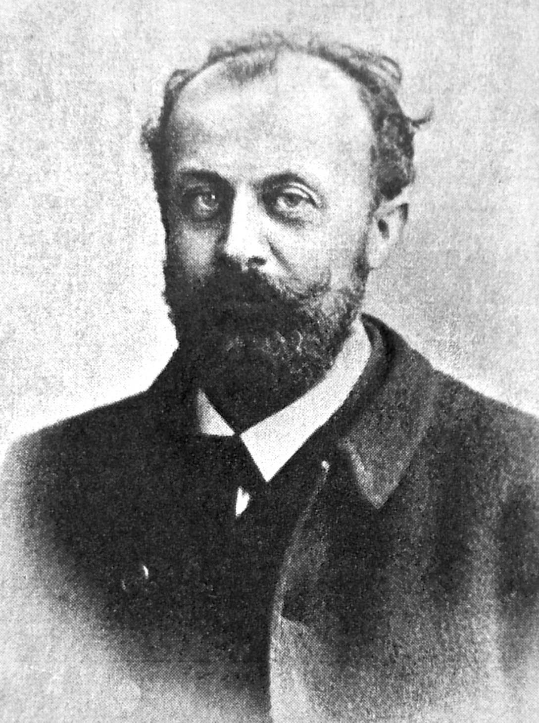 Porträtfotografie des Anatomen Bernhard Solger